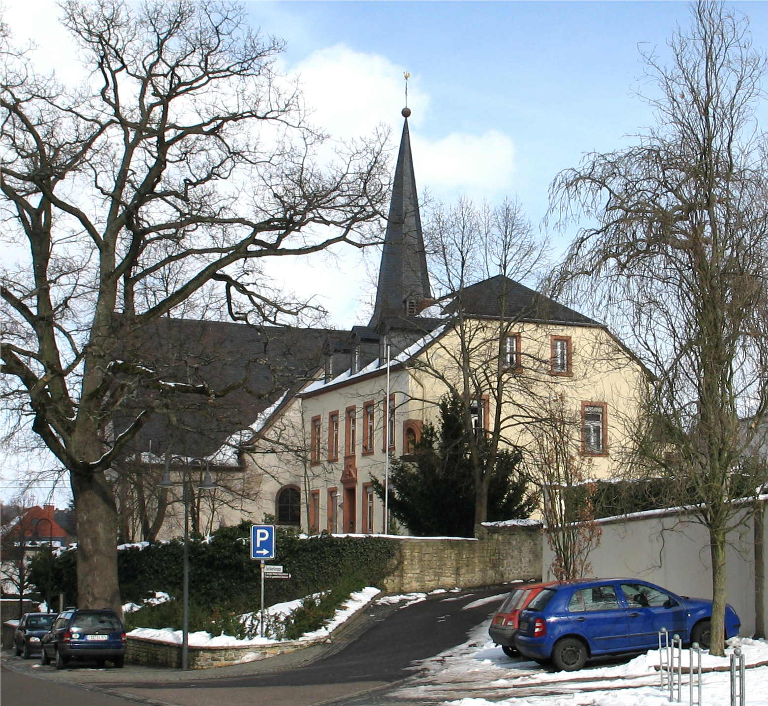 Bei der Kierch zu Perl